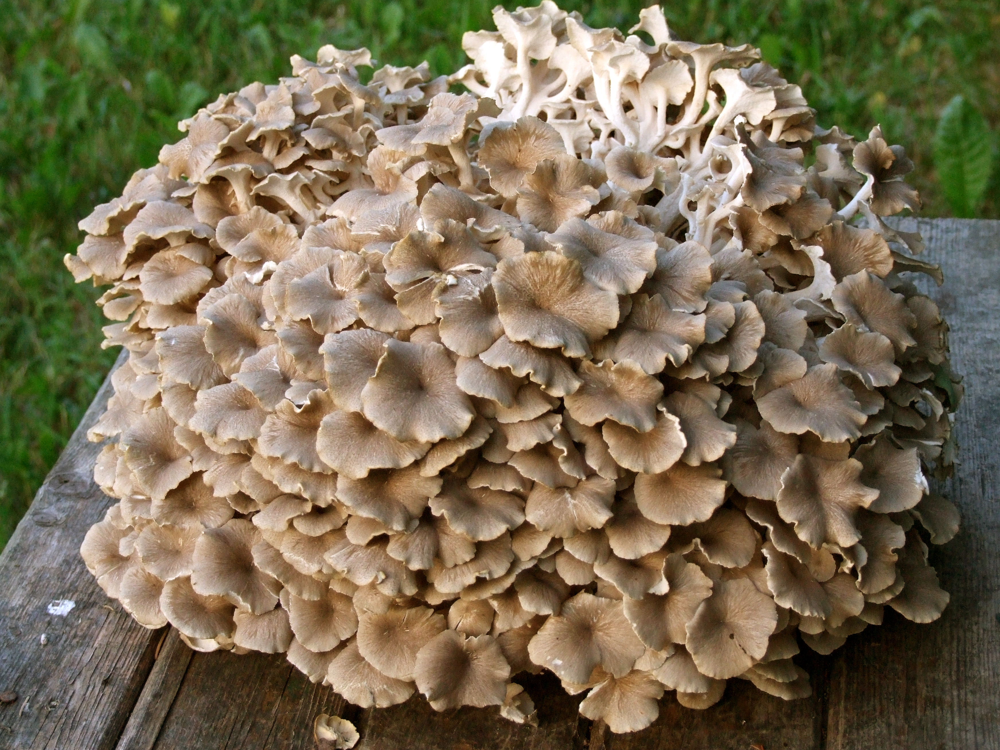 Polyporus umbellatus (syn. Grifola umbellata)